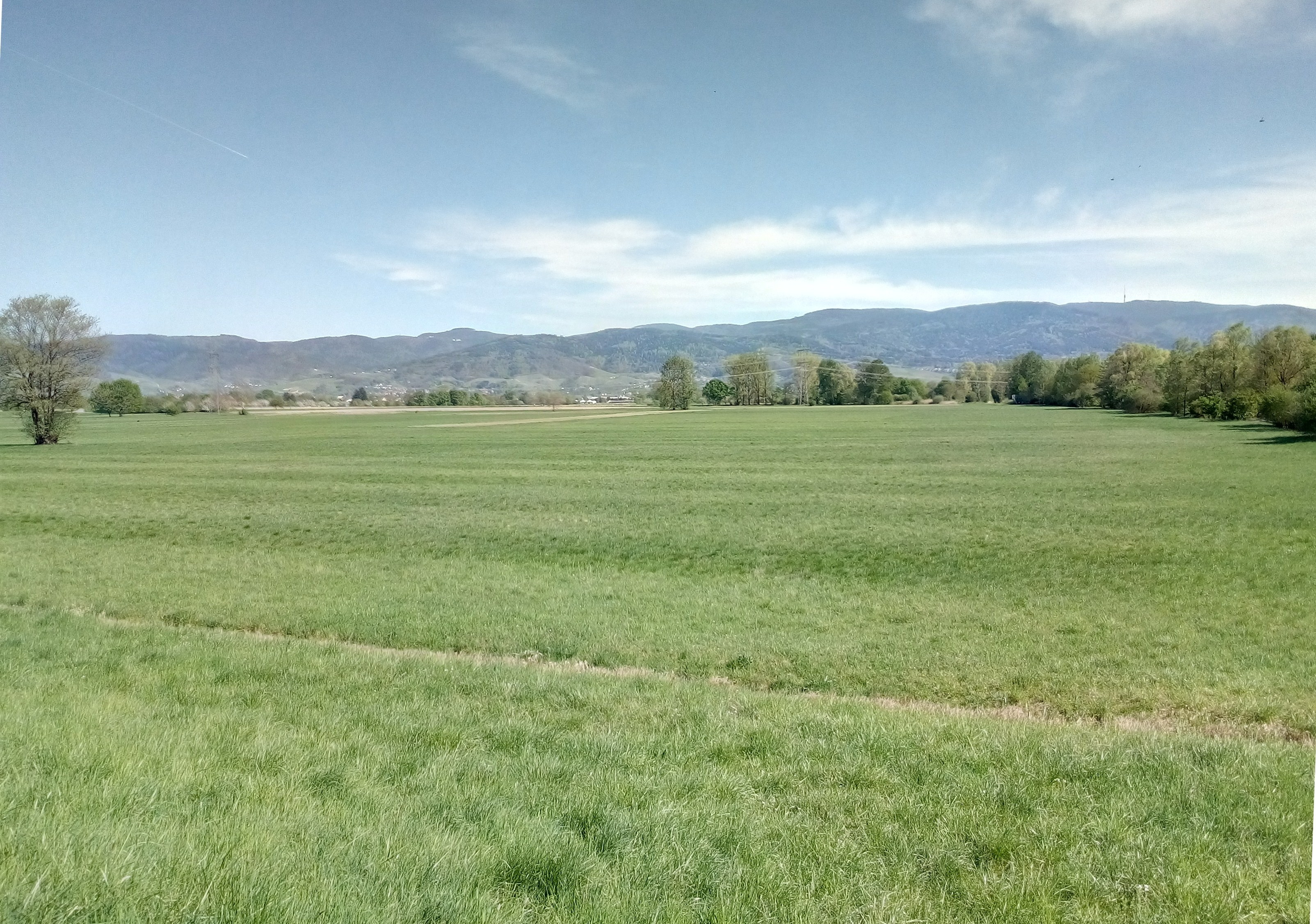 nördliches Becken (Erweiterung) des Hochwasserrückhaltebeckens Hägenich, am Horizont rechts die Hornisgrinde